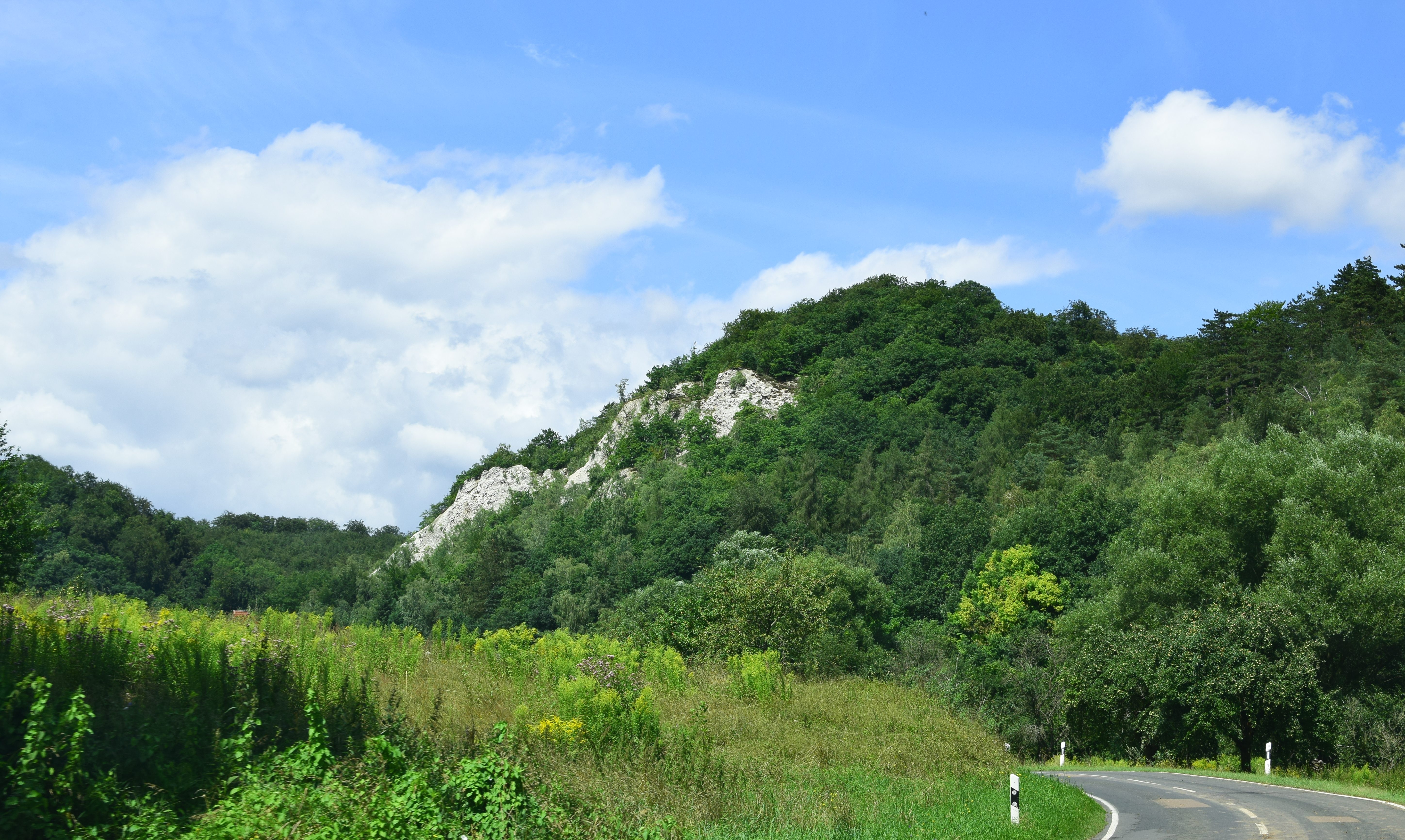 Gipsfelsen an der Straße zwischen Wickerode und Questenberg im Naturschutzgebiet Gipskarstlandschaft Questenberg